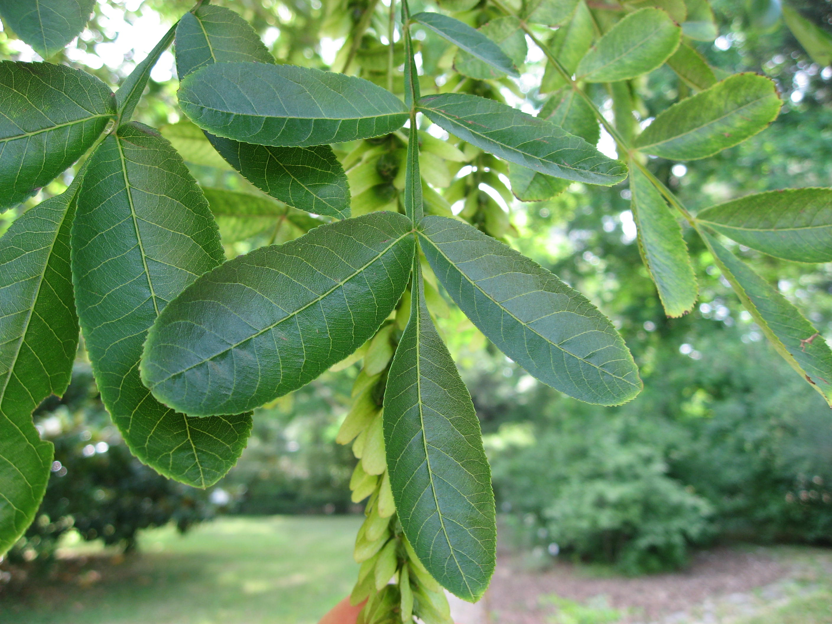 Pterocarya stenoptera in Giardino dei Semplici di Firenze Map: 43° 46' 45" N 11° 15' 39" E